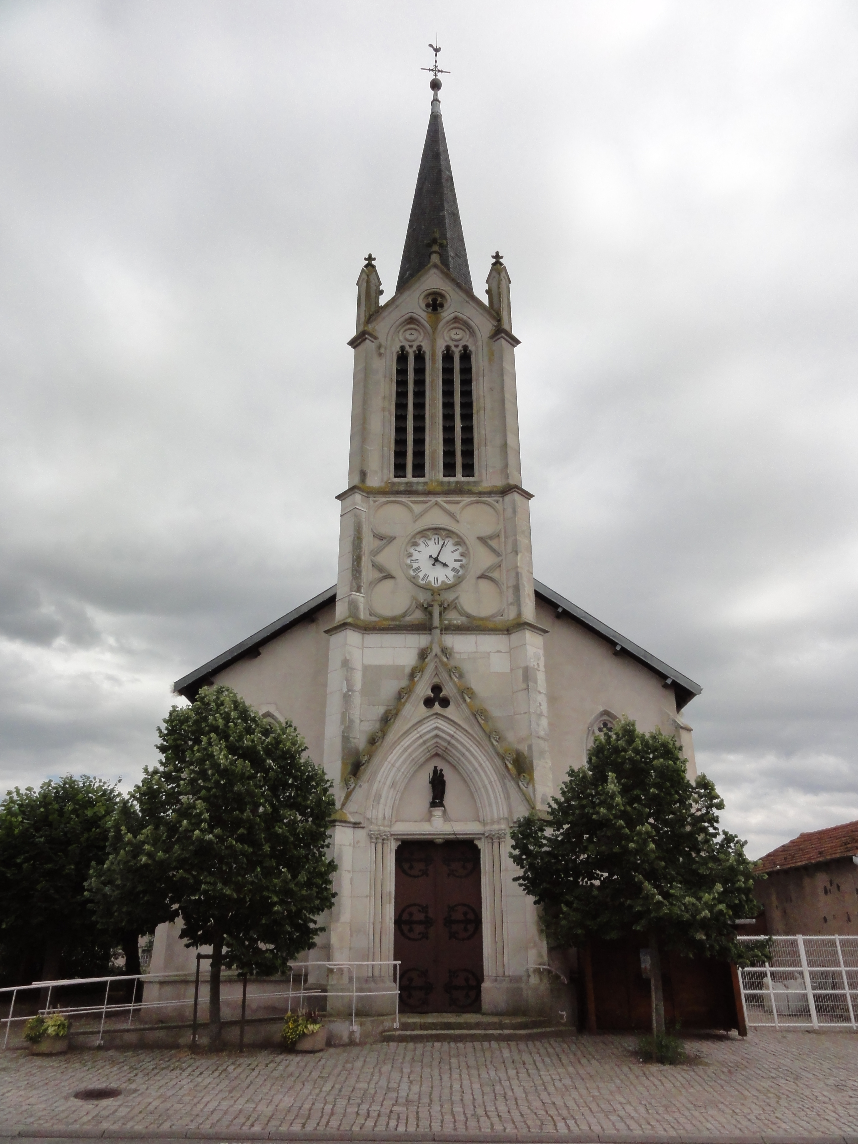 Buissoncourt (M-et-M) église